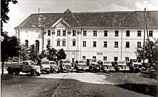 Historisches Bild der Brauerei Aldersbach